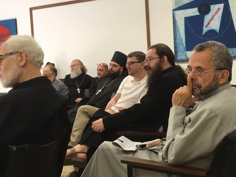 Конгресс Российской католической церкви византийского обряда в Сан Феличе, 2017 год